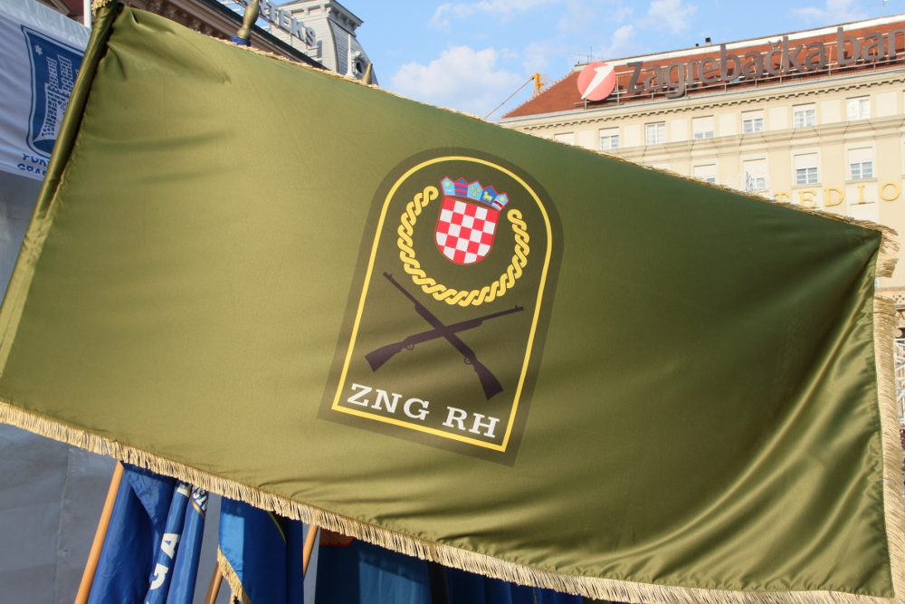 Ceremonijalni program u sklopu obilježavanja 20. obljetnice formiranja Oružanih snaga Republike Hrvatske, Dana Oružanih snaga i Dana Hrvatske kopnene vojske. Hodni program ešalona ratnih zastava, nastup Orkestra OSRH i počasno ceremonijalni program Počasno zaštitne bojne